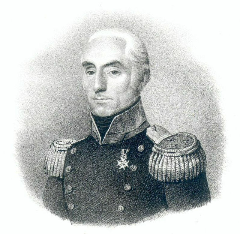 Portret van J. van den Velden, geboren 1768, vice-admiraal; lid van het Hoog Militair Gerechtshof, president van de provinciale regering van Utrecht (1813-1814), burgemeester van Utrecht (1814), overleden 1854. Borstbeeld links, in uniform.